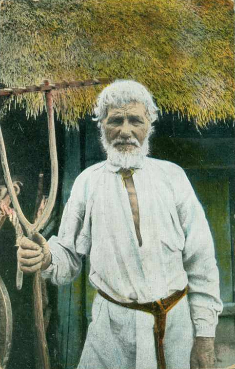 Волинянин: Волинянин